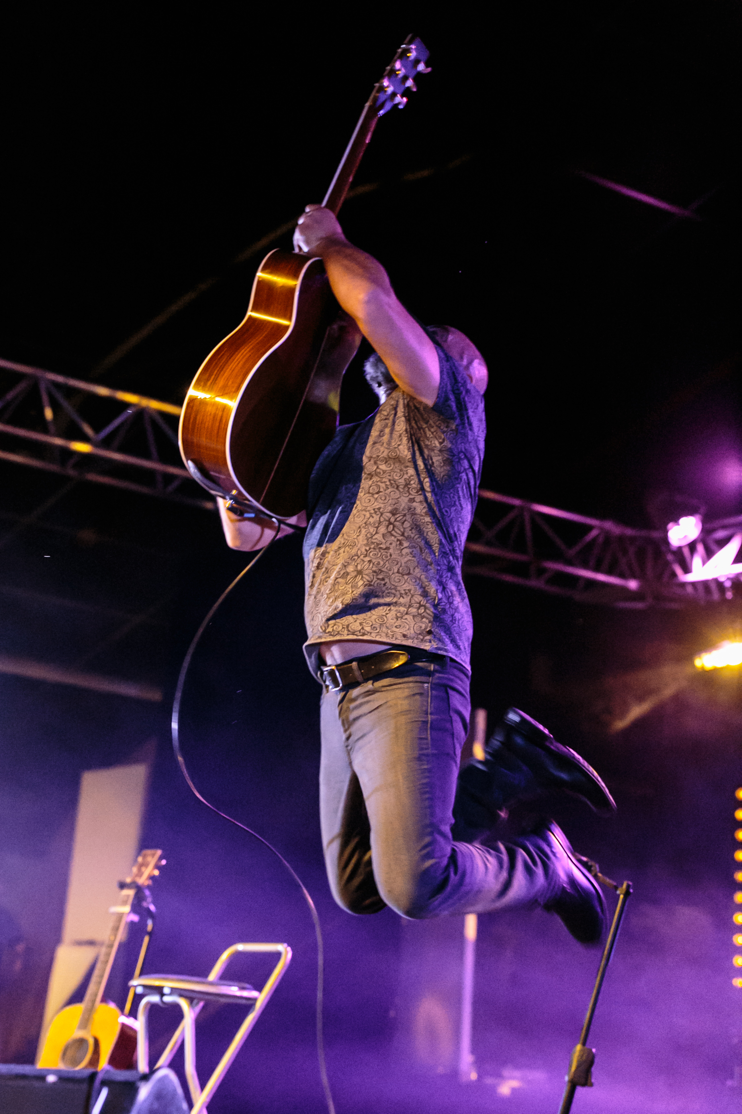 Jean-Charles Guichen lors du fest-noz Stered au parc des expositions Lango de Morlaix le 9 avril 2016.